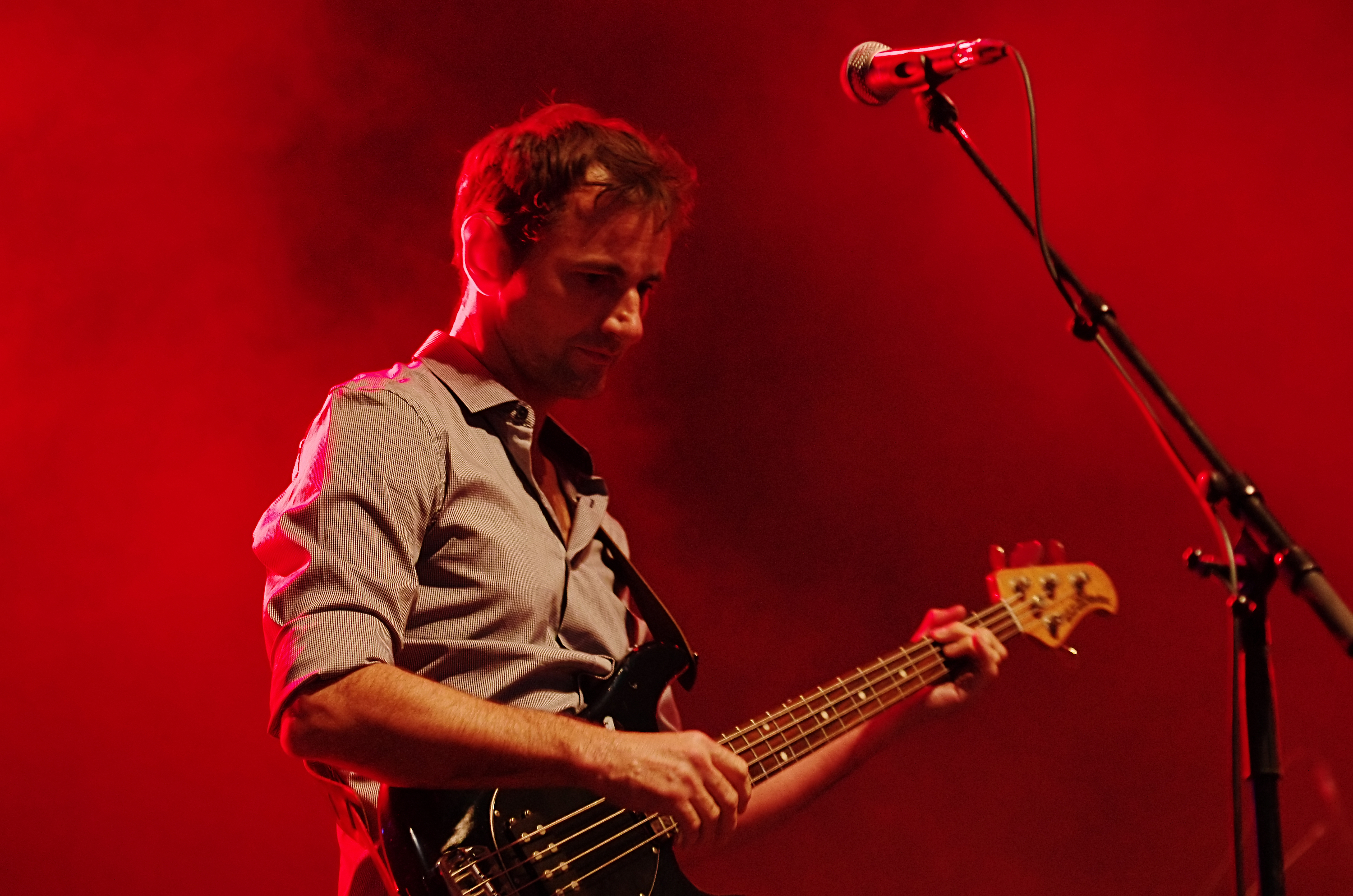 James (band) auf dem Haldern Pop Festival 2013. Hauptbühne. Besetzung: Tim Booth (Gesang) Jim Glennie (Bass) Larry Gott (Gitarre) Saul Davies (Gitarre, Violine, Percussion) Mark Hunter (Keyboards) Dave Baynton-Power (Schlagzeug) Andy Diagram (Trompete, Percussion)